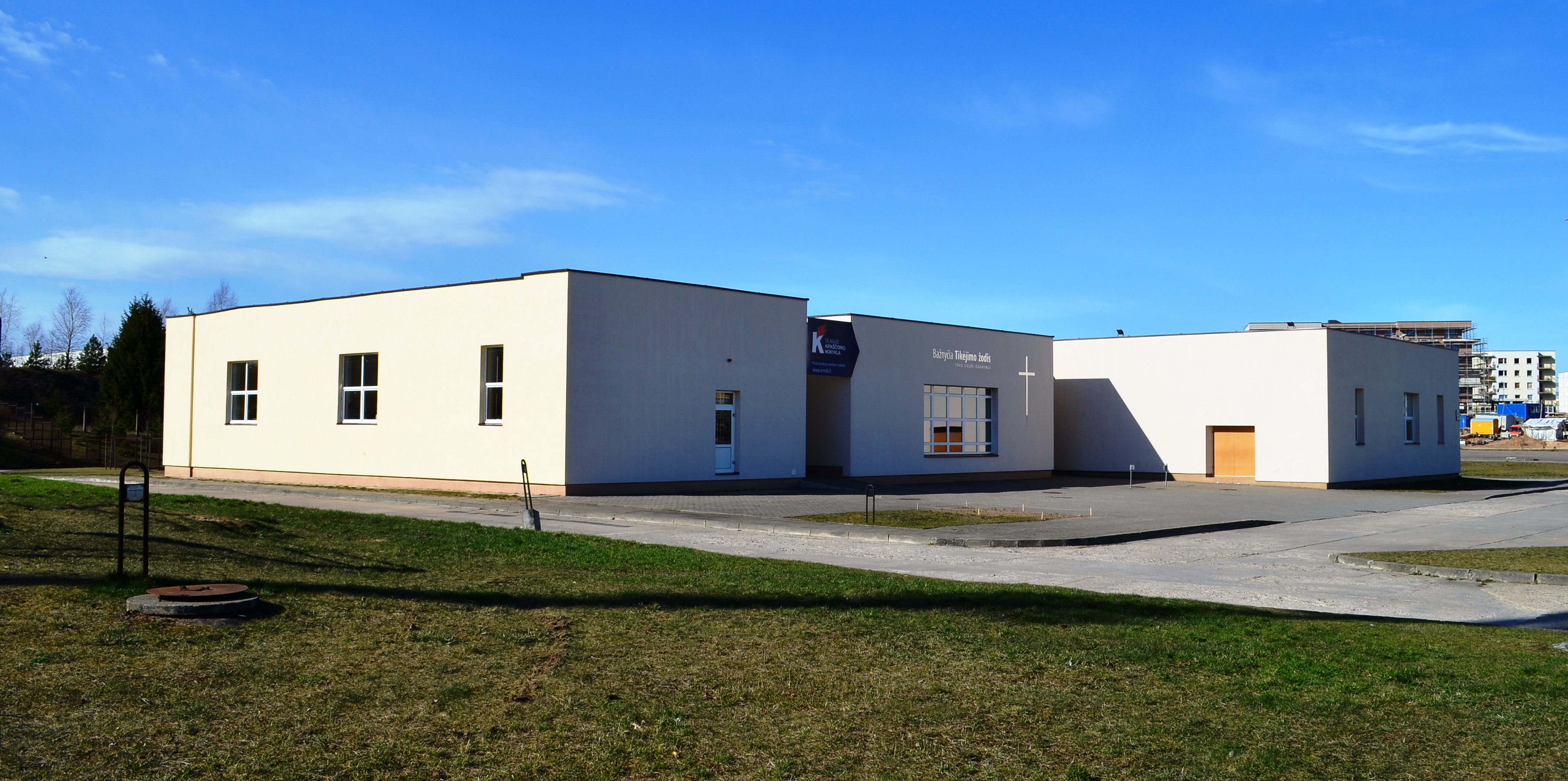 Tikėjimo žodžio bažnyčia, Salotė, Vilnius